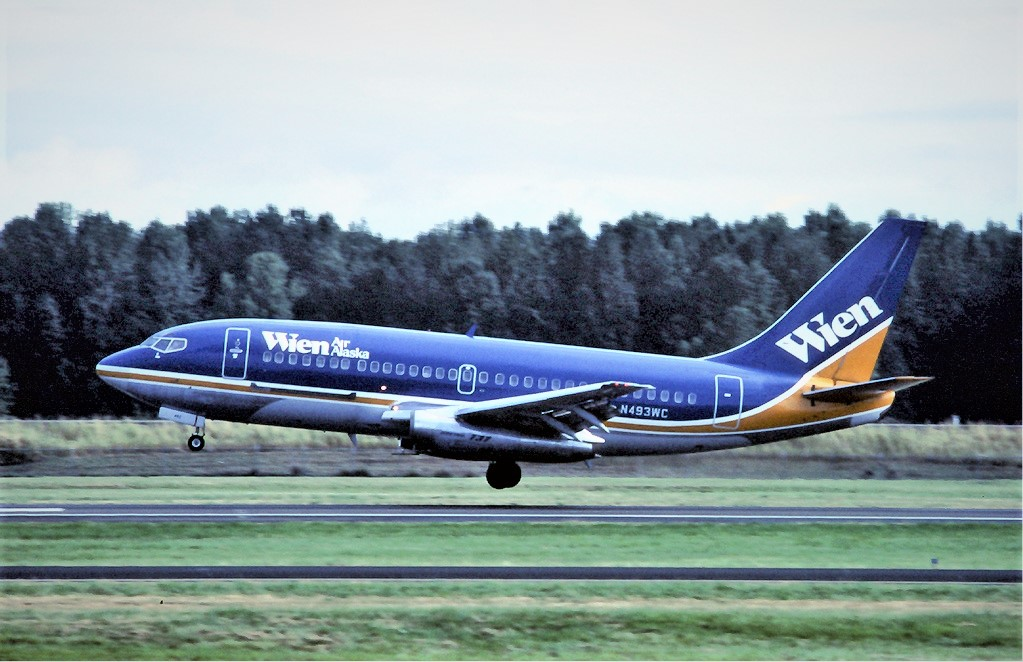 Wien Air Alaska Boeing 737-200